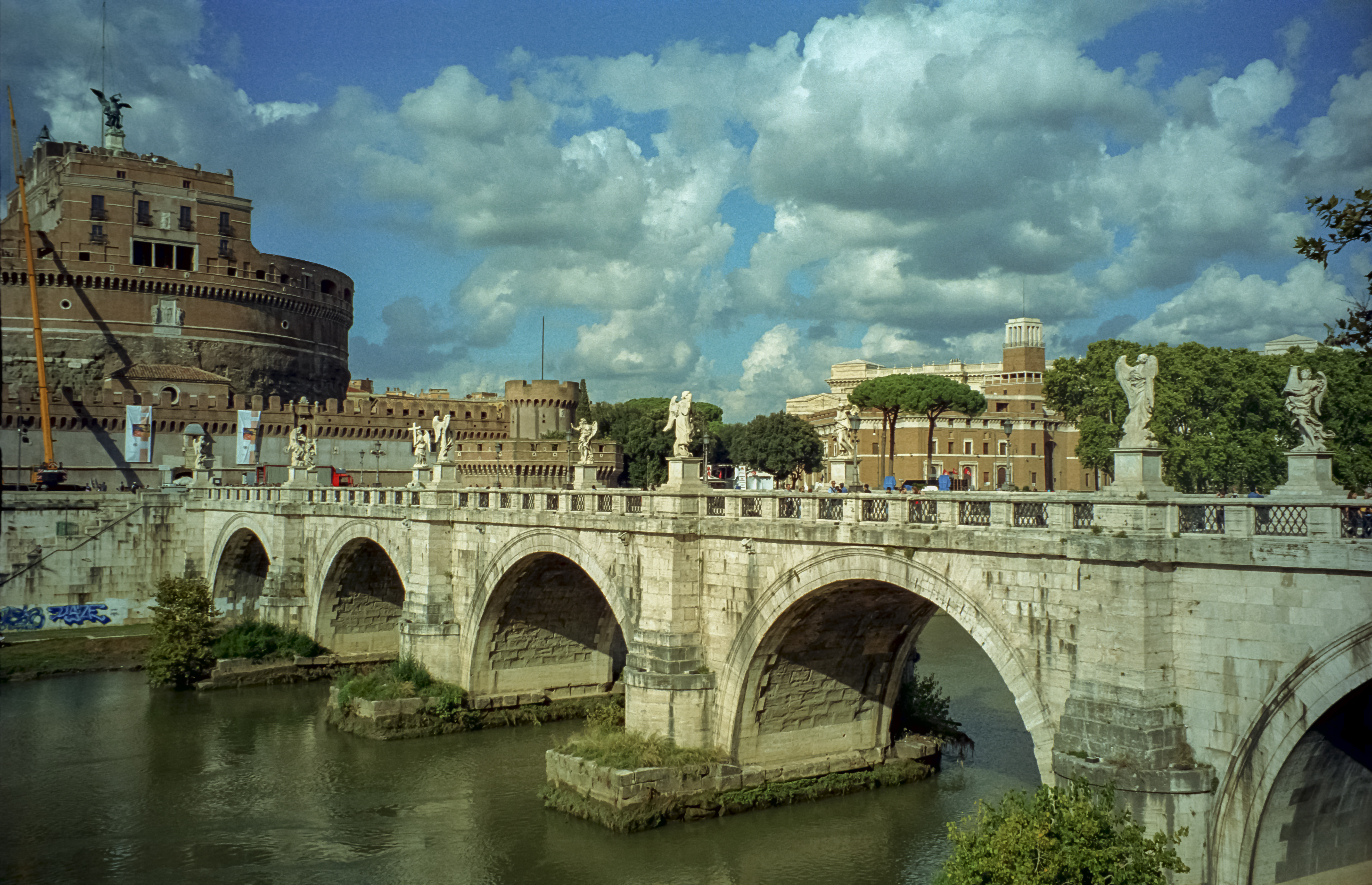 Roma, Ponte Sant'Angelo